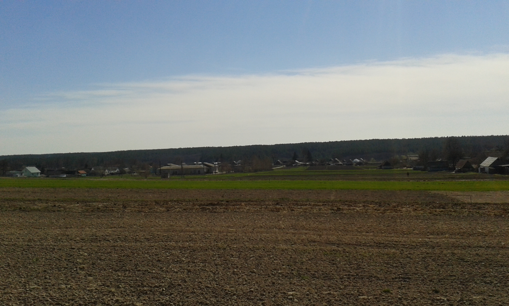 панорама села